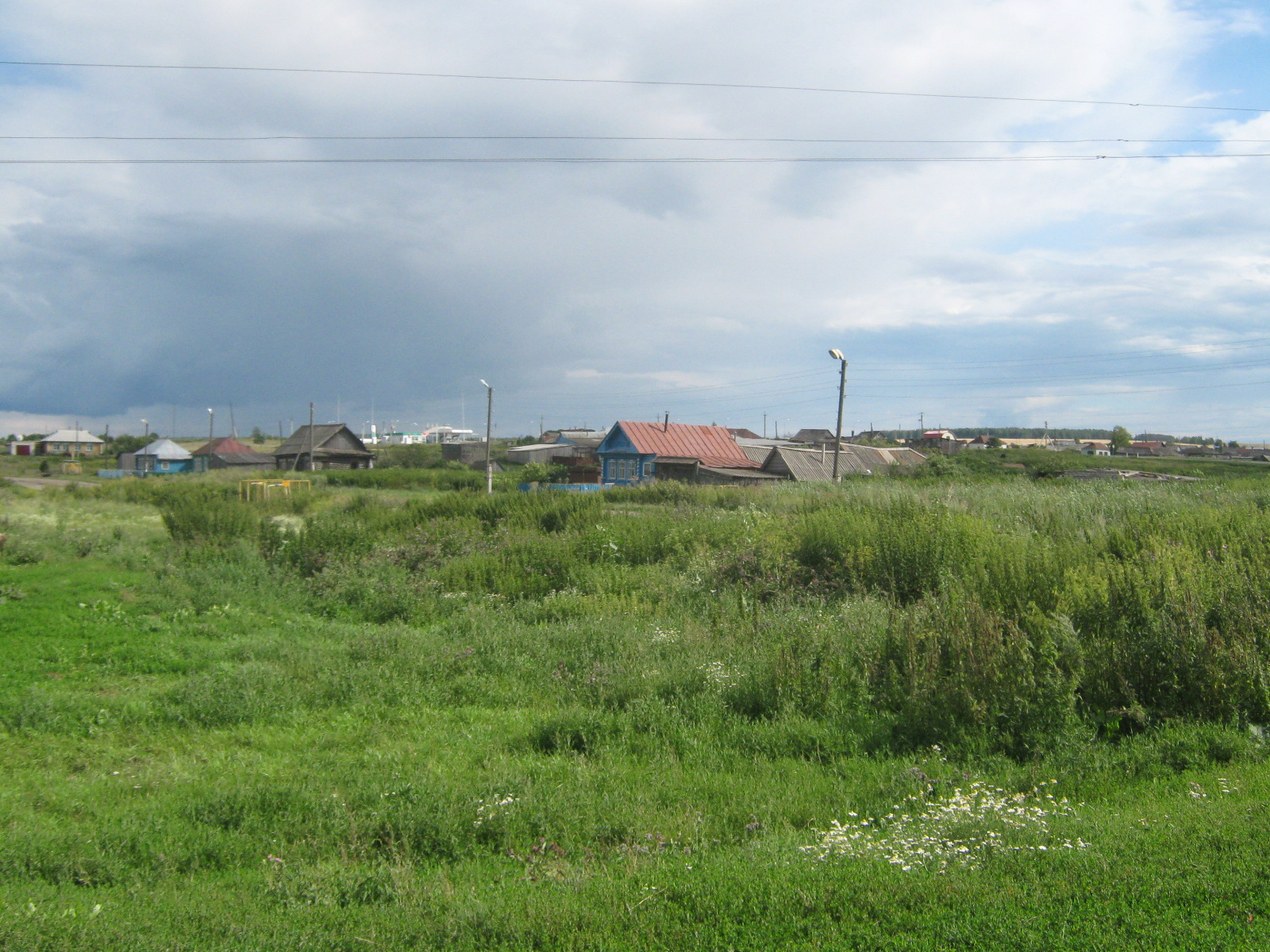 Село Урено-Карлинское, 2012 г.